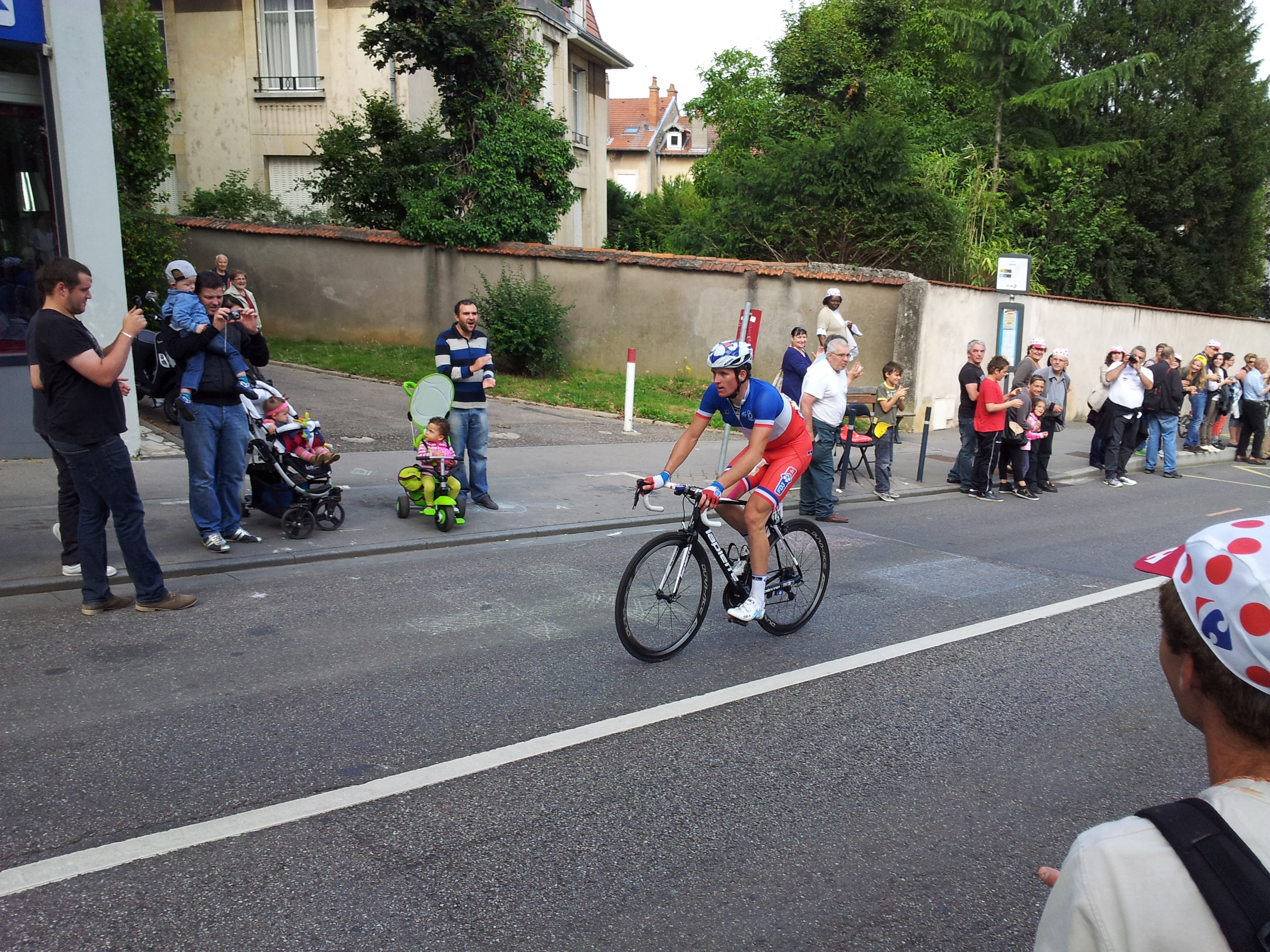 7e étape du Tour de France 2014 au début de la Côte de Boufflers.